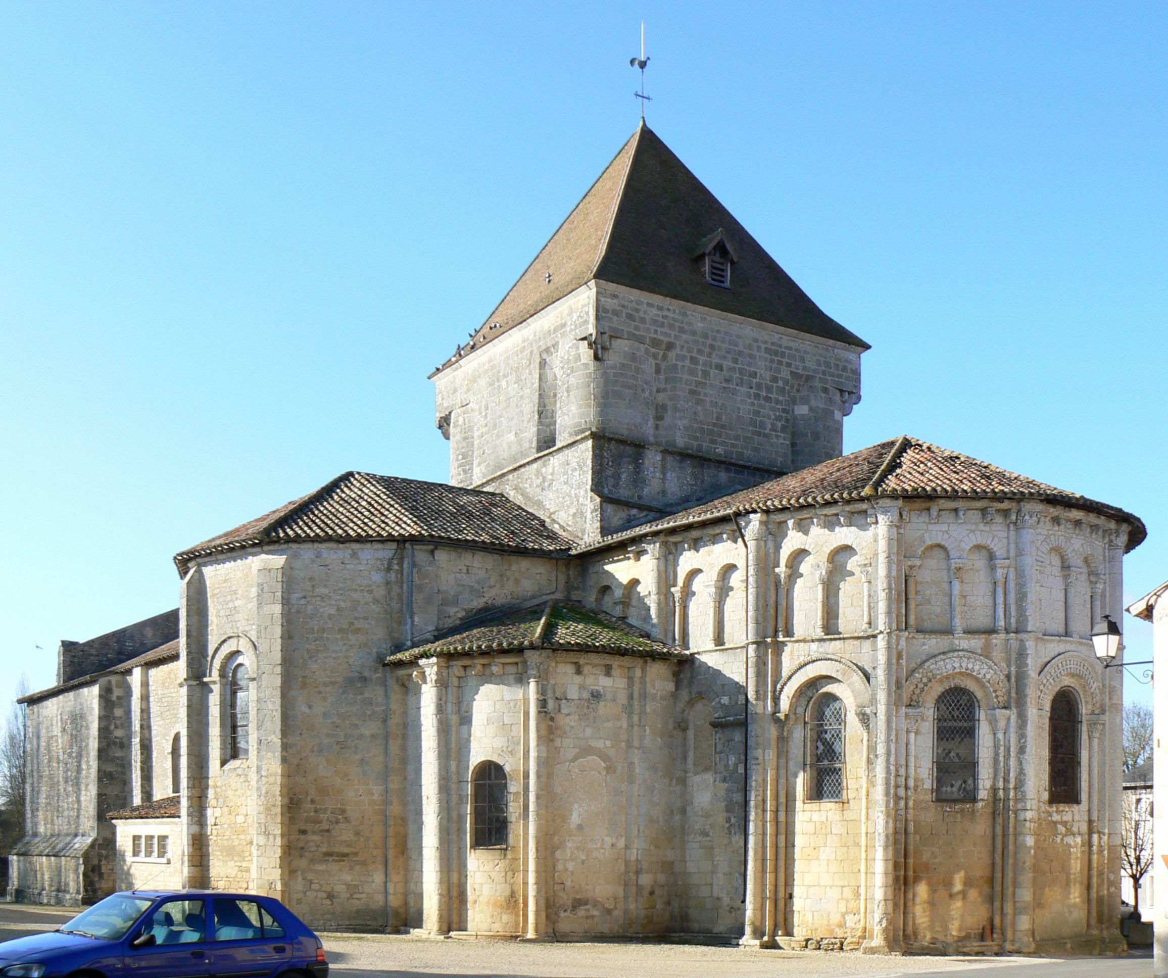 Église Saint-Maurice de Saint-Maurice-la-Clouère, du XIIe siècle.